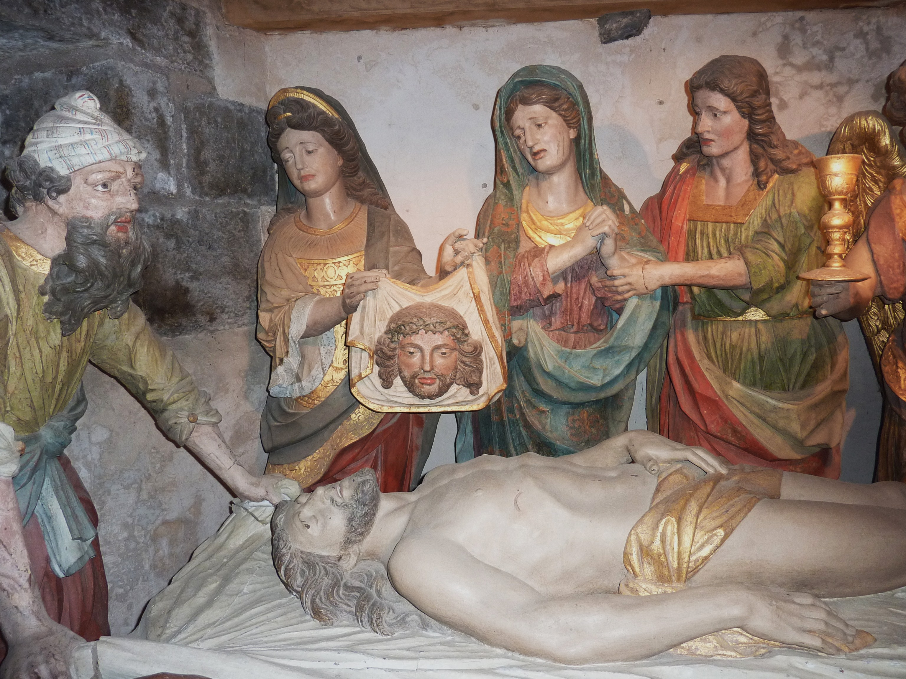 Saint-Thégonnec : ossuaire, mise au tombeau, vue d'ensemble